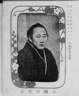 相撲年鑑 （1913年発行、根岸清美堂）